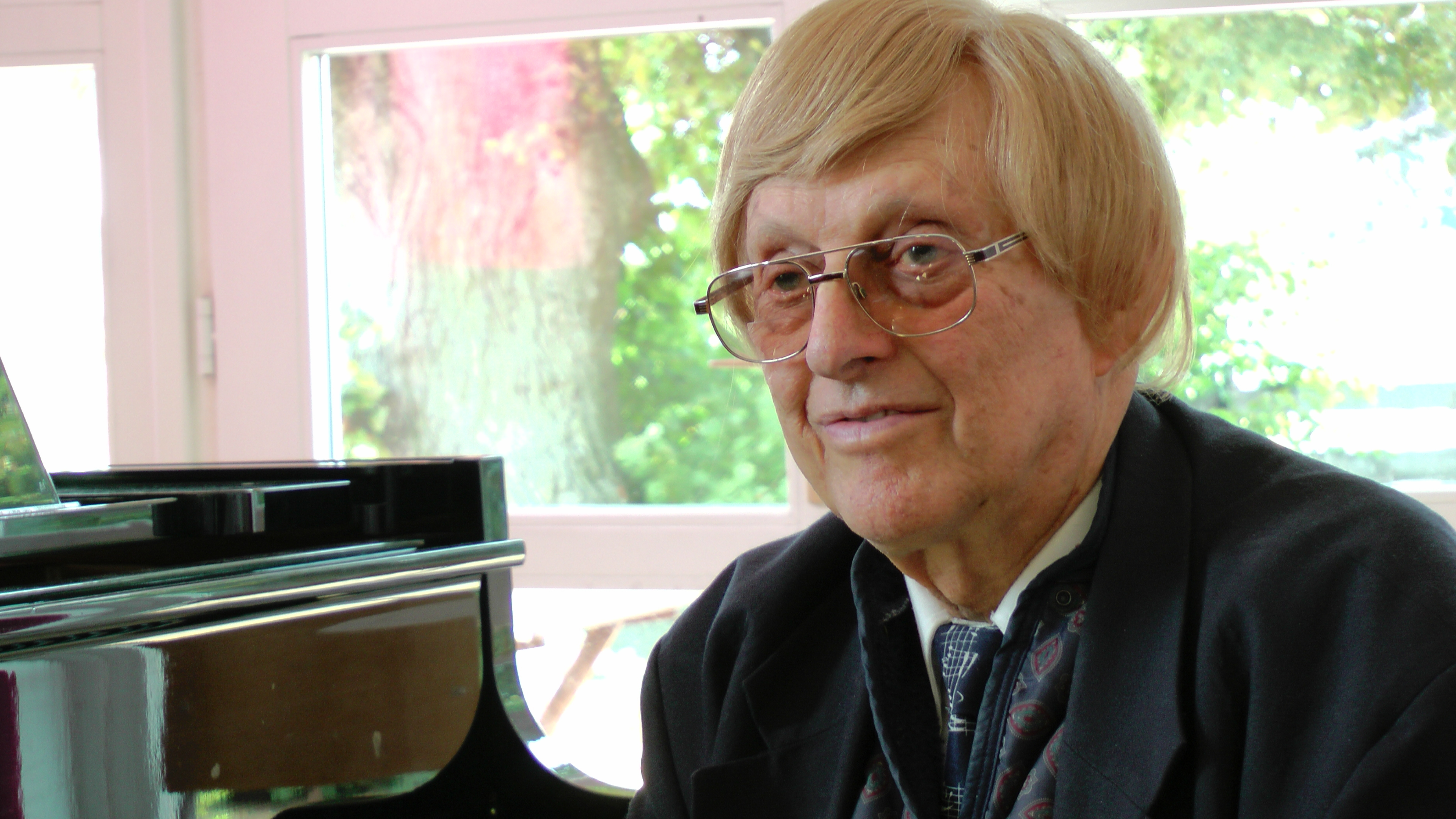 Fotografie des Pianisten Peter Feuchtwanger